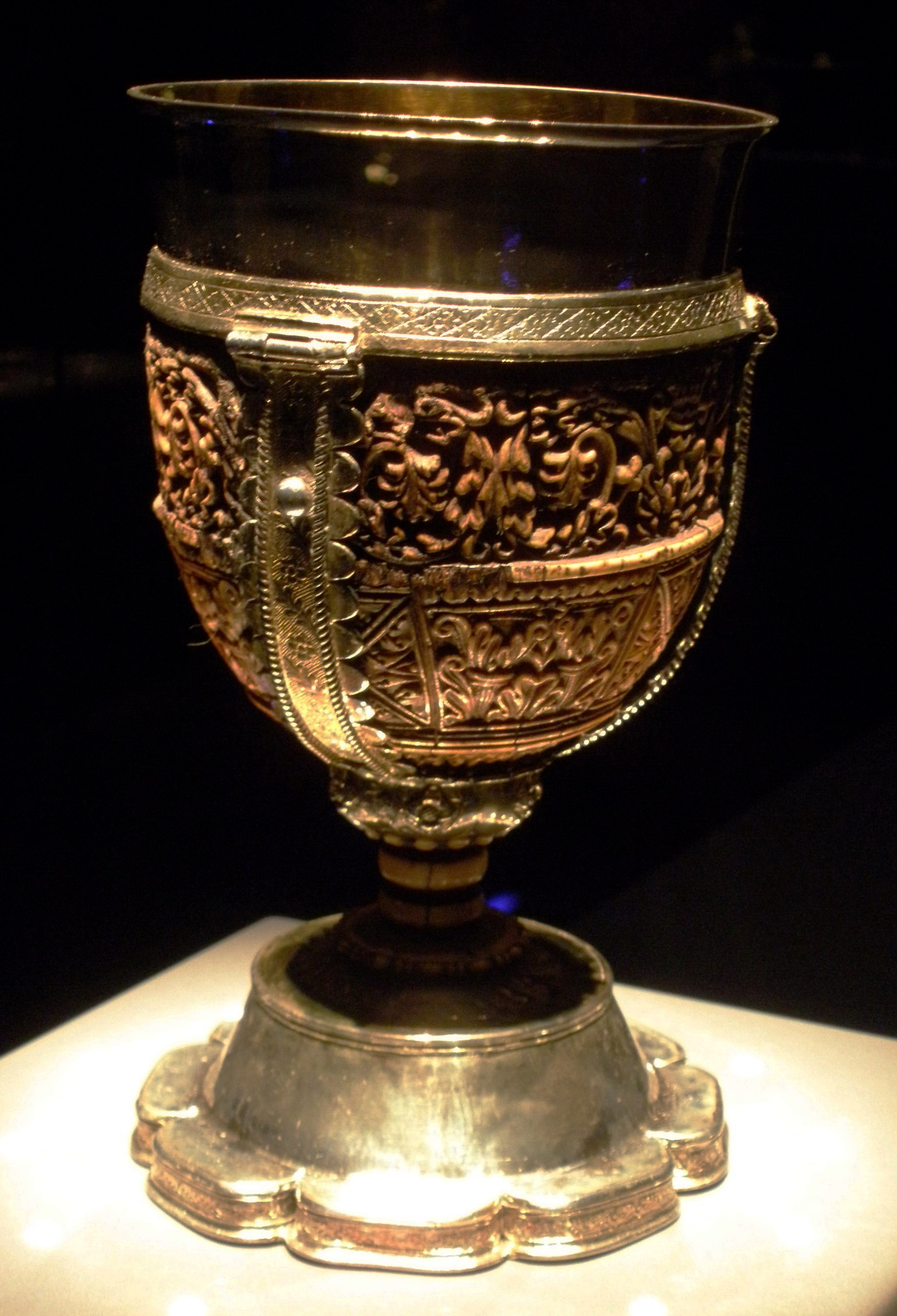 Lebuïnuskelk, bewerkte ivoren drinknap (1e helft 9e eeuw) in zilveren houder (14e eeuw), Museum Catharijneconvent, Utrecht